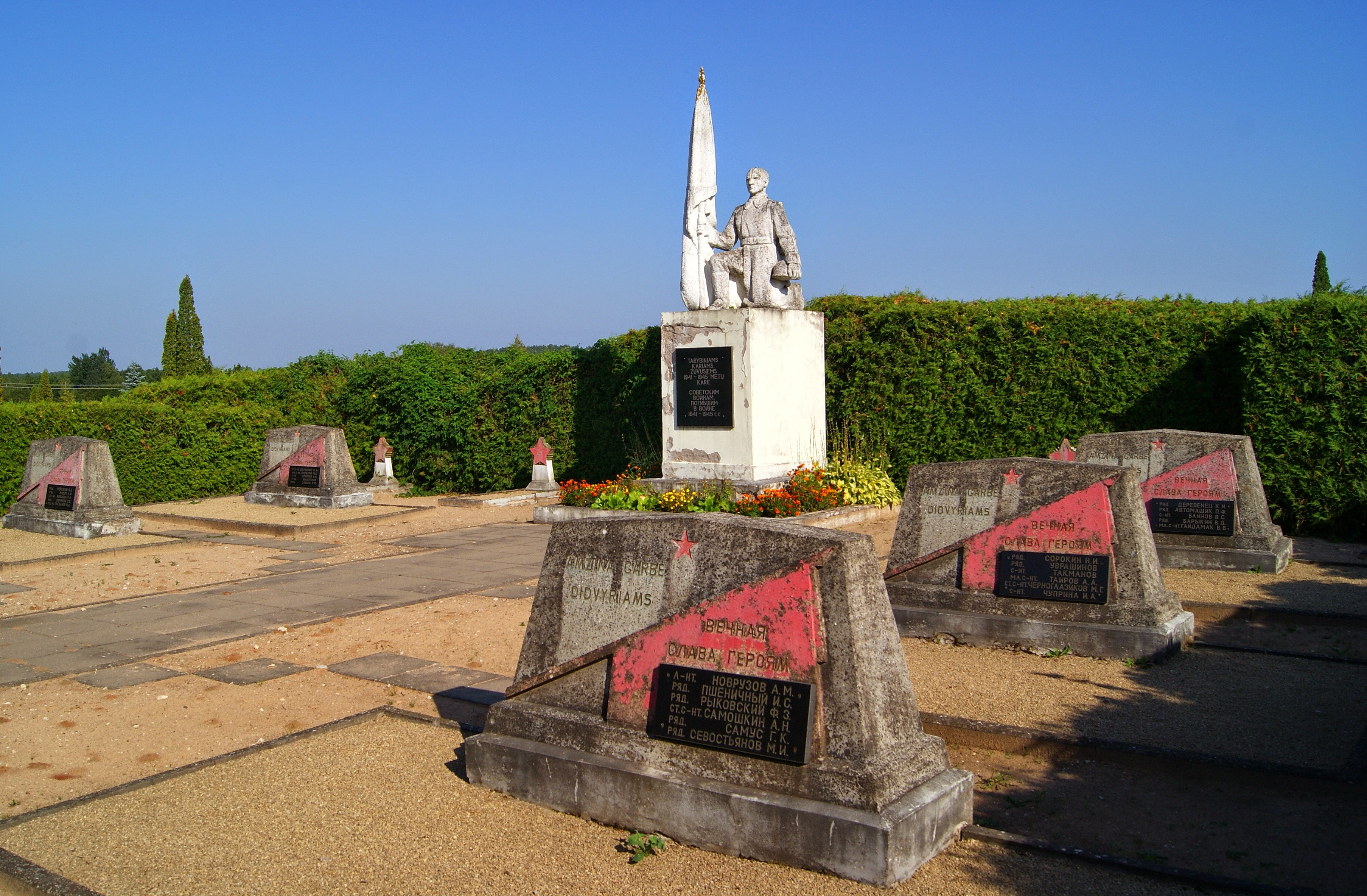 Obeliai, Lithuania